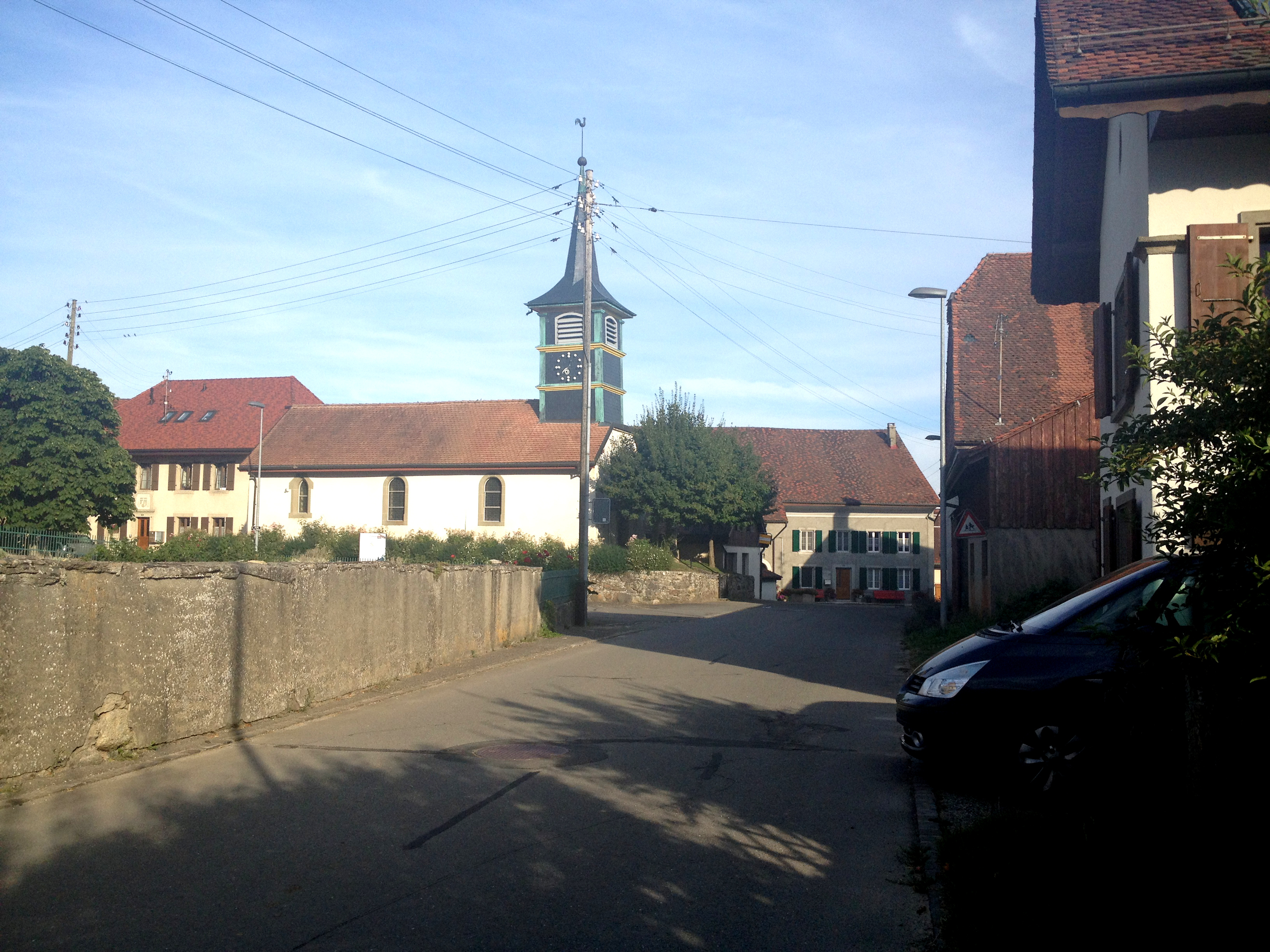 Correvon dans la commune vaudoise de Montanaire en Suisse.